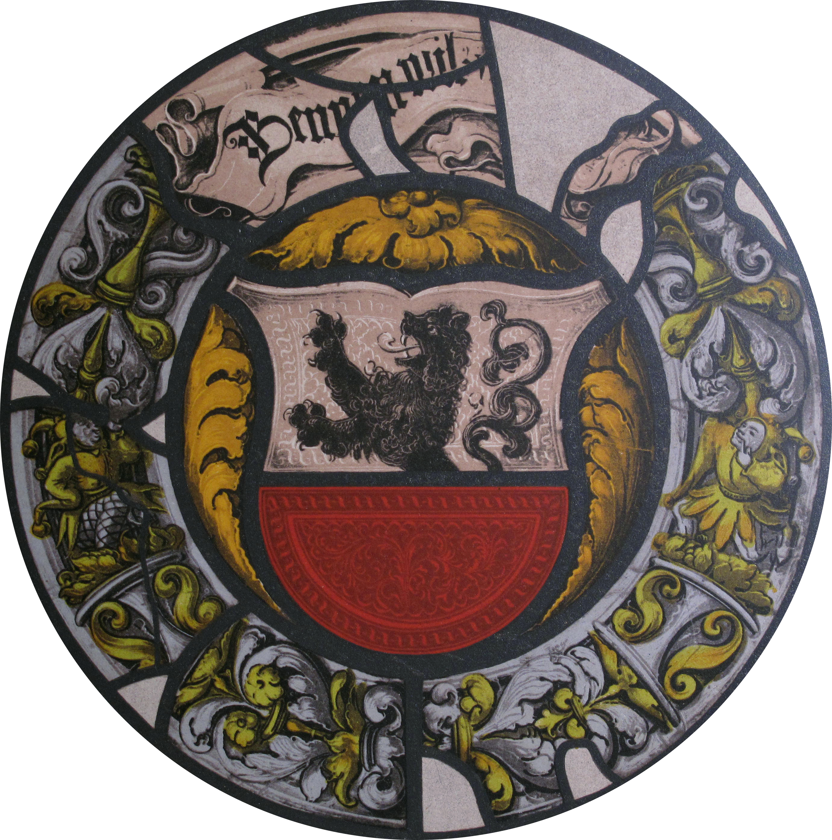 Wappen des Geschlechts von Bennenwil (Bennenwyl, Bennewil, Beneweil).